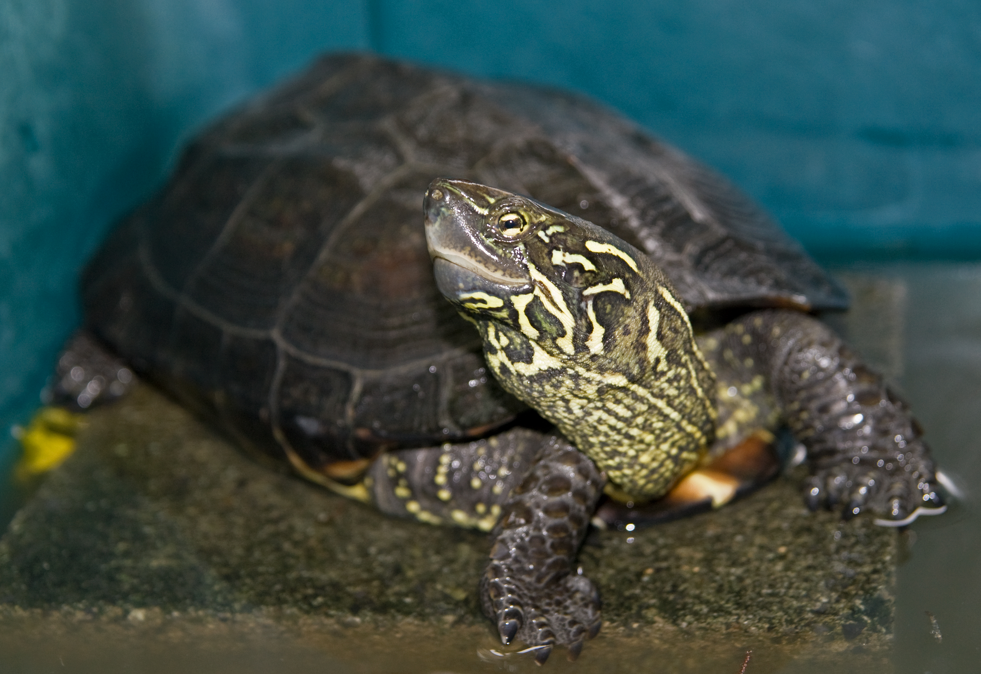 クサガメ (学名:Chinemys reevesii)